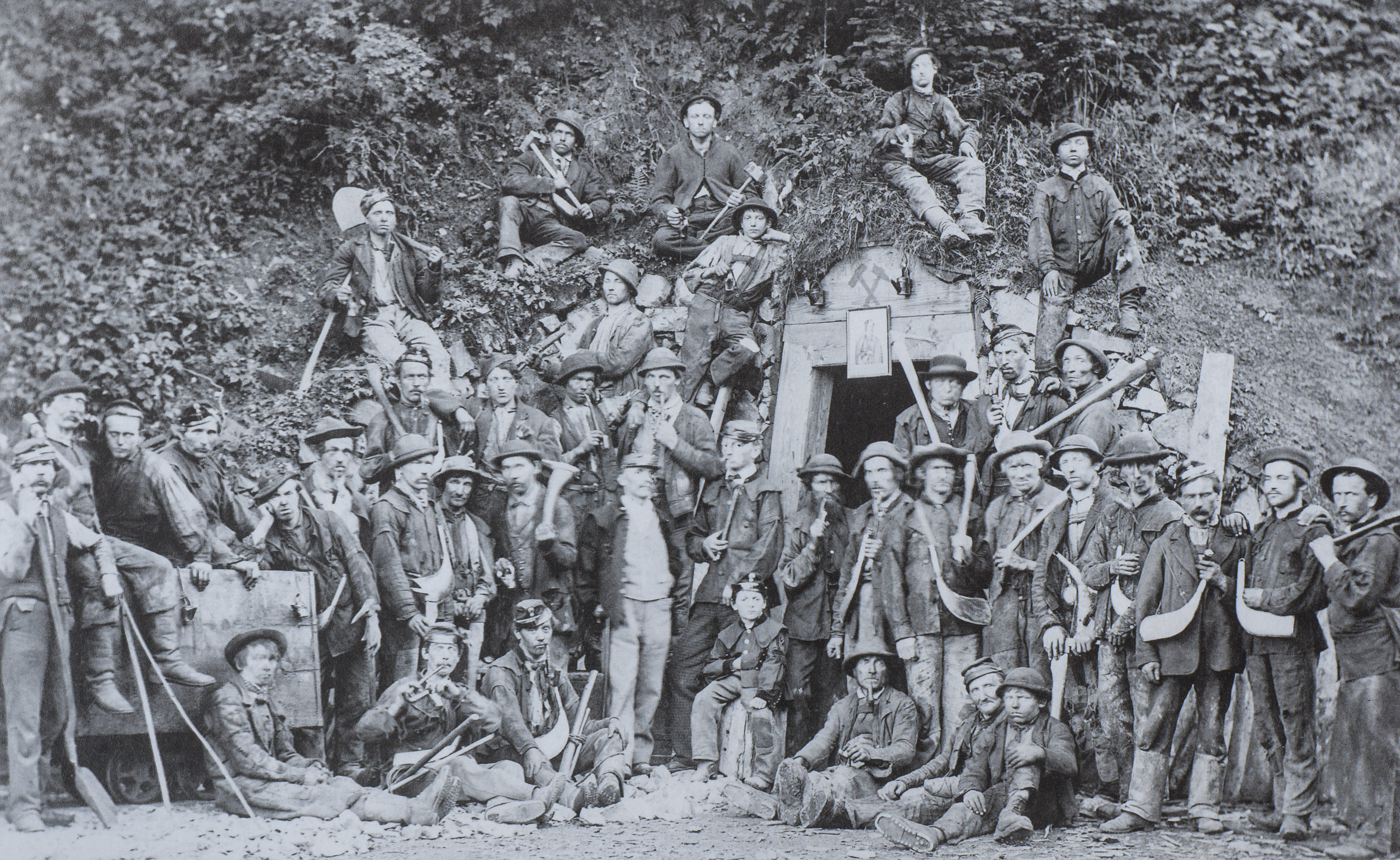 Bergarbeiter vor dem Barbarastollen in Hollenstein an der Ybbs, beim Bauernhof Schneibb